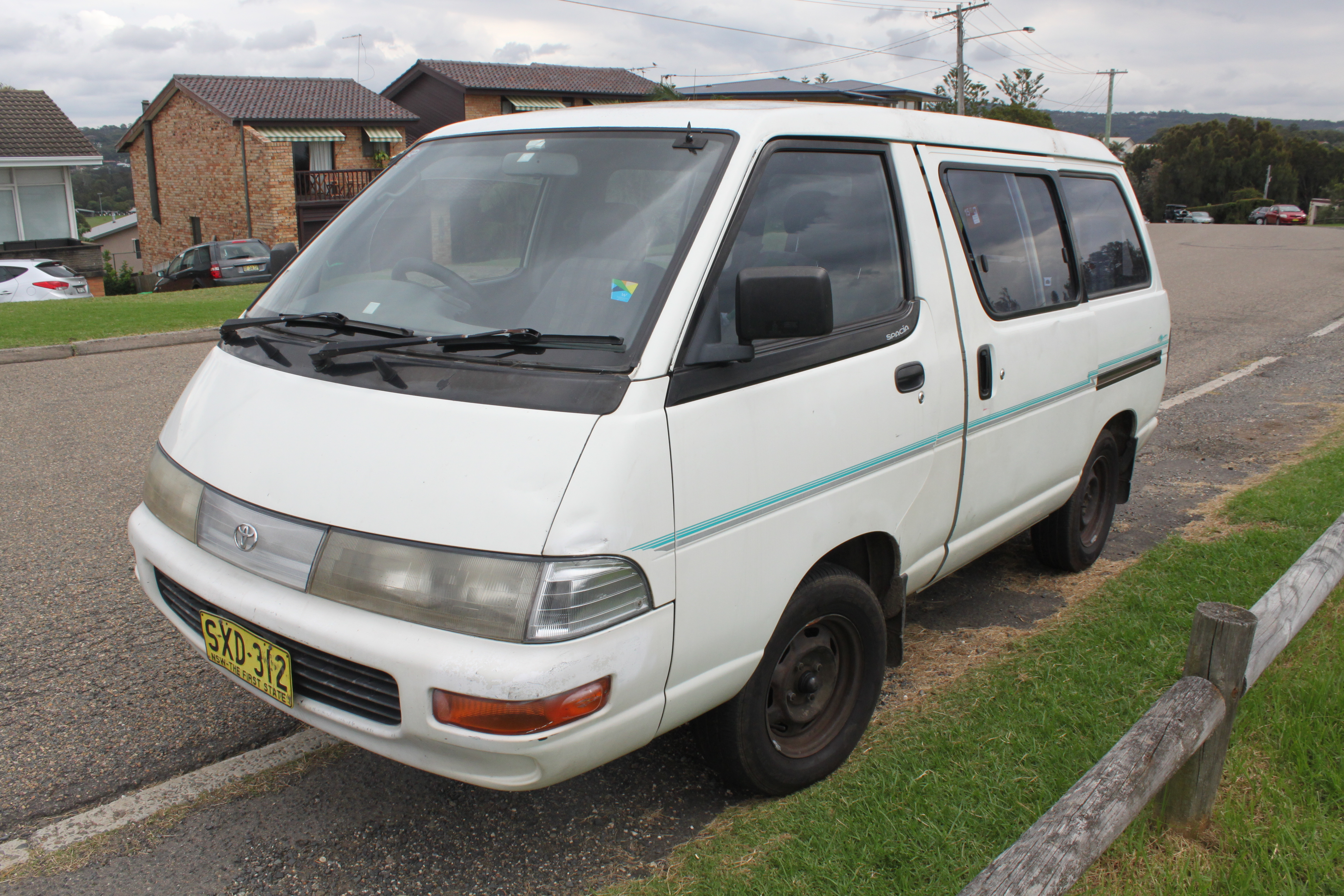 Toyota Spacia YR22RG GXi